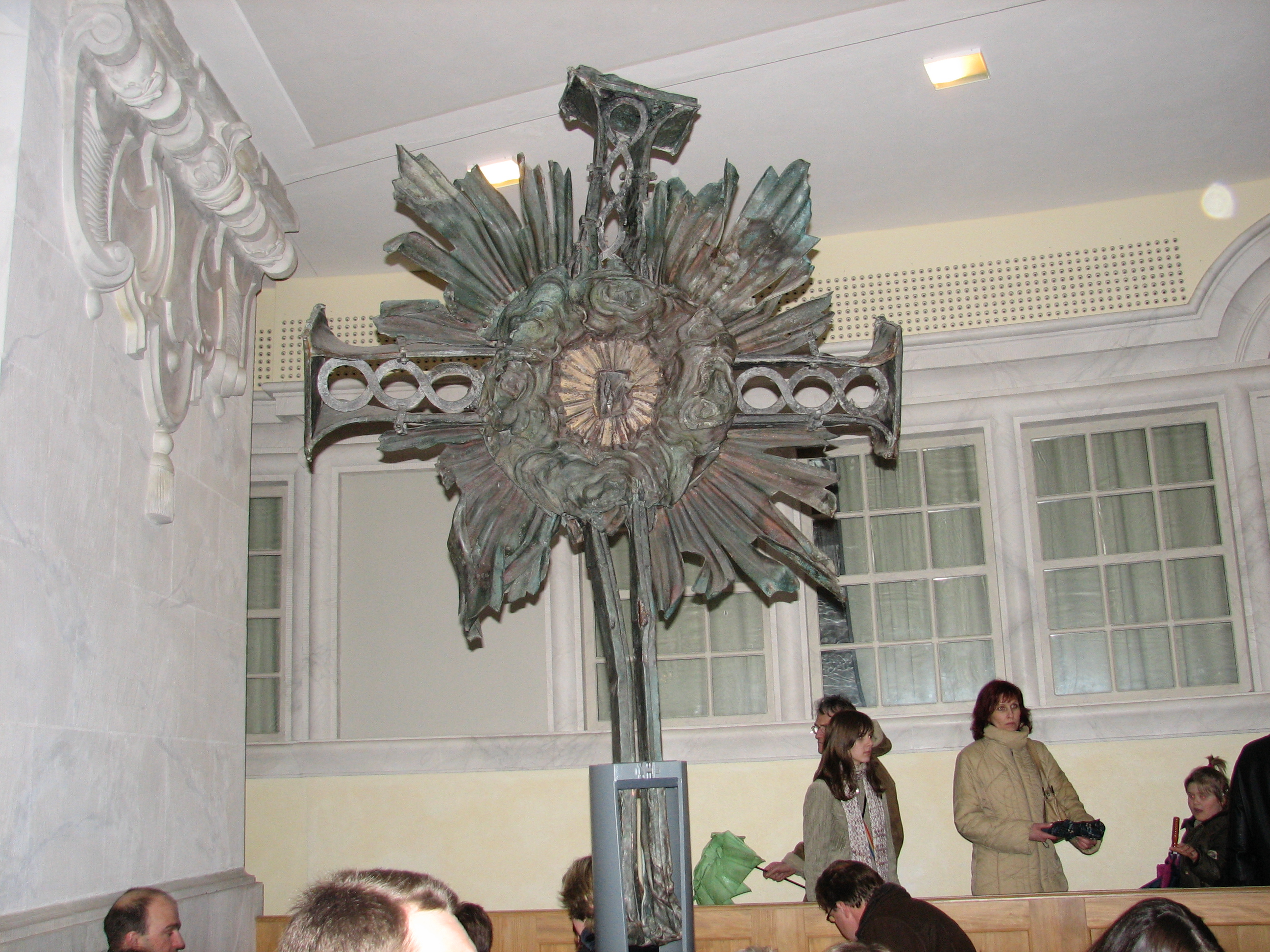 Frauenkirche - Das alte Kreuz